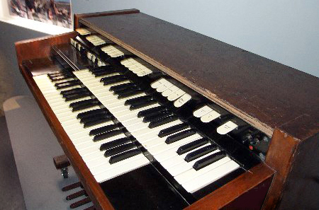 Photos de l'exposition "Pink Floyd Interstellar" à la Cité de la Musique (Porte de la Villette, Paris). Read the story at . Lire le compte-rendu de l'expo sur Hammond M-100 series Contemporary style, may be one of M-102 (Walnut) M-111 (Mahogany) M-162 (Maple)